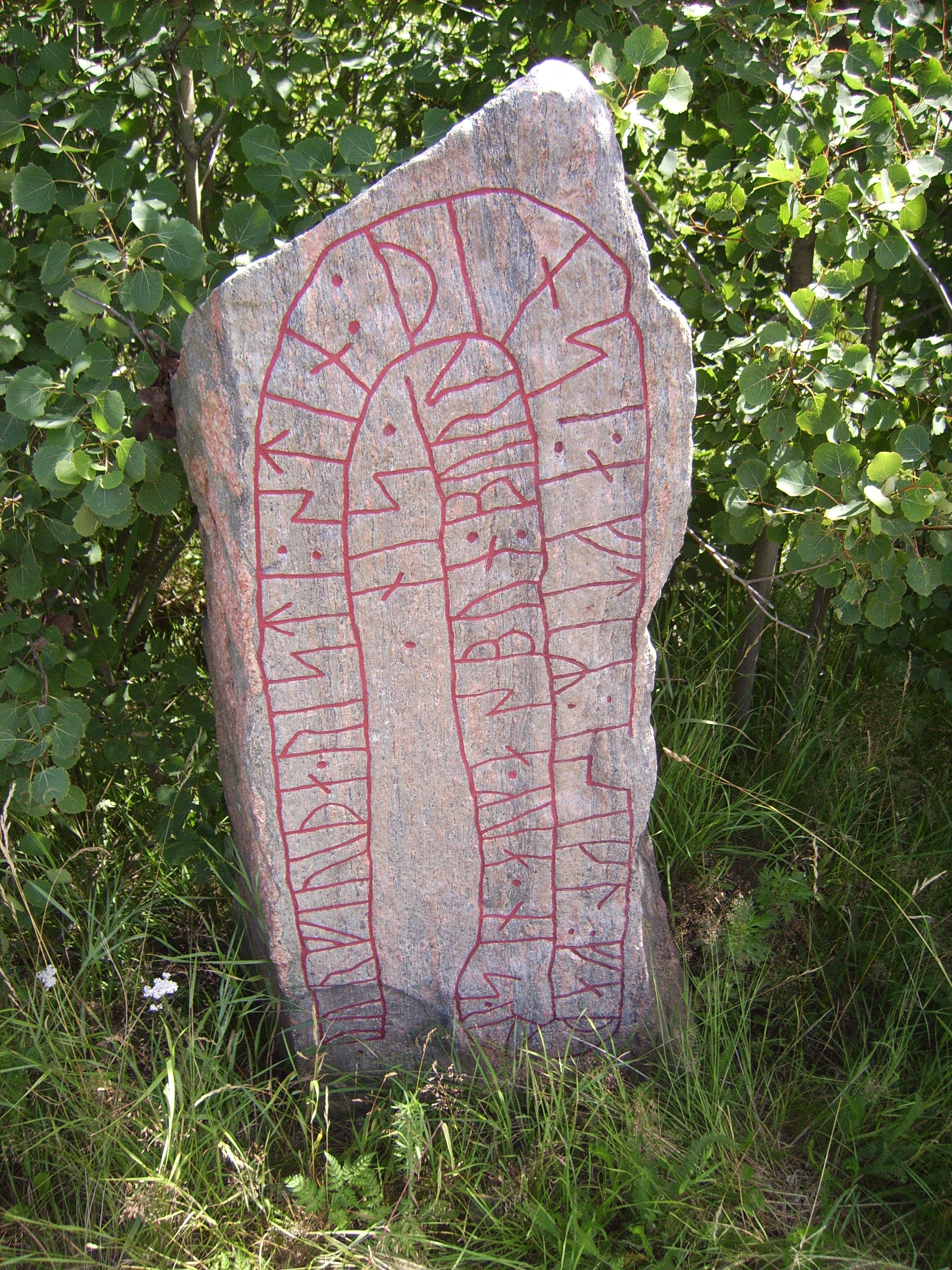 Herstaberg, Ströbo äng, The Kvillinge parish. Runestone Ög 47, Sweden.